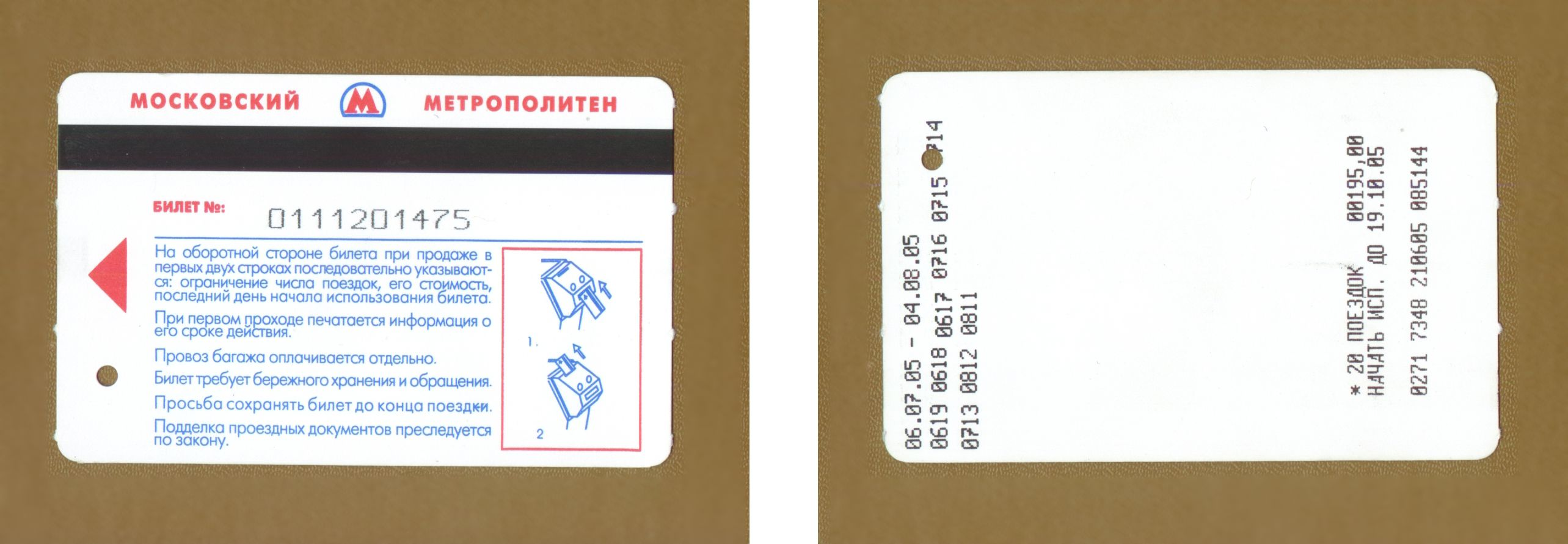 Magneta bileto de moskva metroo por 20 veturaĵoj. Ĝi estas kartona, de amplekso 84*54 mm. Ĝi jam estis uzita 9 foje, do ĝi taŭgas por ankoraŭ 11 fojoj (nombro "11" en fino de tria linio sur la rea flanko). Teksto sur vizaĝa flanko de la bileto: "Moskva metropoliteno Bileto № ... Sur rea flanko de la bileto dum vendo en du unuaj linioj sinsekve estas skribitaj: limo de kvanto da veturaĵoj, kosto, lasta tago kiam oni devas komenci uzi la bileton. (vere en tiu bildo ĉi tiuj linioj estas du antaŭlastaj, ĉar sur ĵus vendita bileto estas nur tri lastaj linioj) Dum la unua uzo informo pri periodo de uzado estas printata. (en la unua linio) Veturigado de pakaĵo pagatas aparte. La bileto bezonas gardan konservon kaj uzon. Konservu la bileton ĝis fino de la veturaĵo. Falsado de biletoj estas punata laŭ leĝo." Mi, aŭtoro de la bildo, permesas al ĉiuj uzi ĝin kun ĉi tiaj kondiĉoj